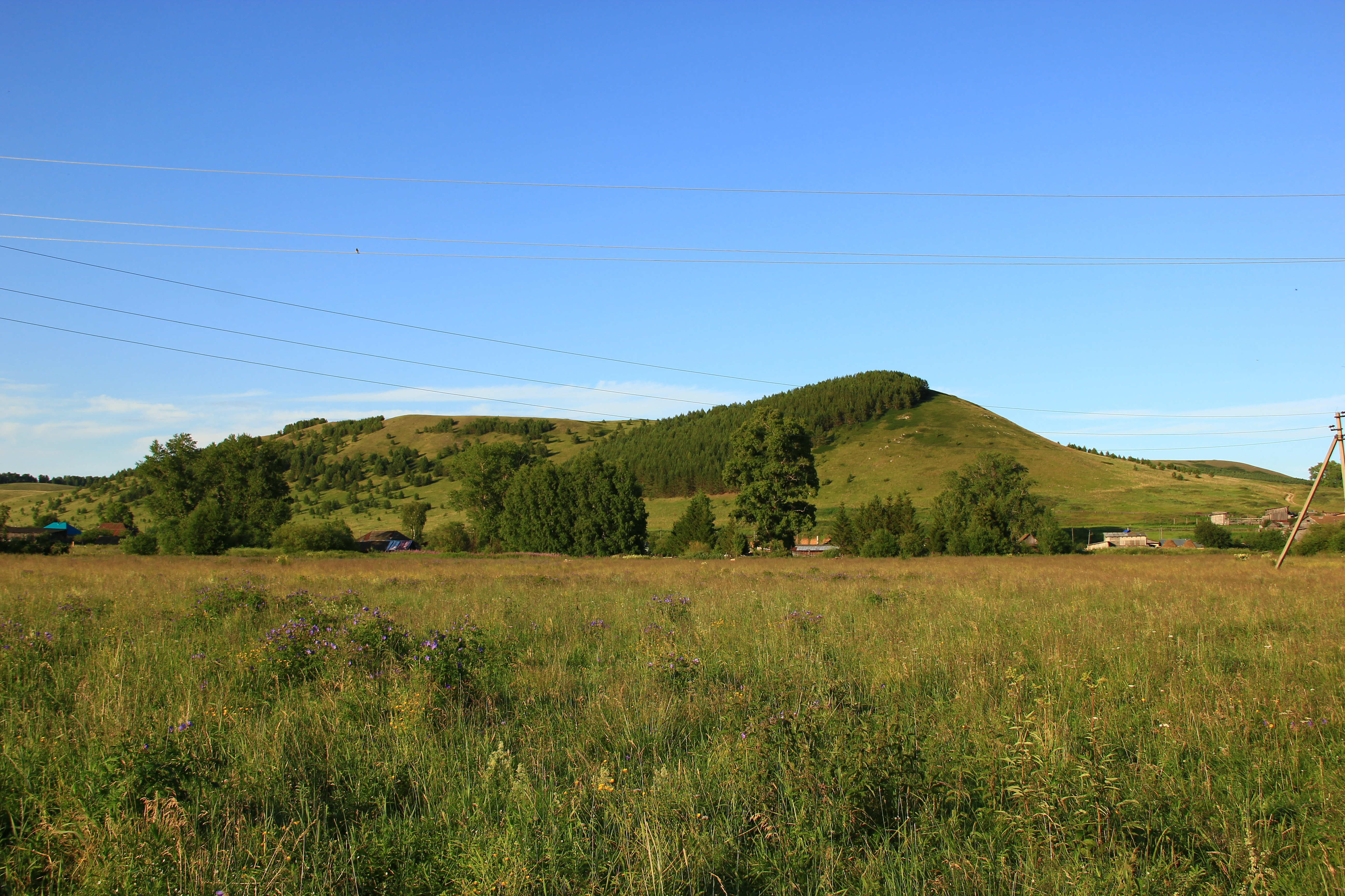 Гора Большая Тастуба: Дуванский район, Башкортостан This image is related to the protected area of Russia number 0210121